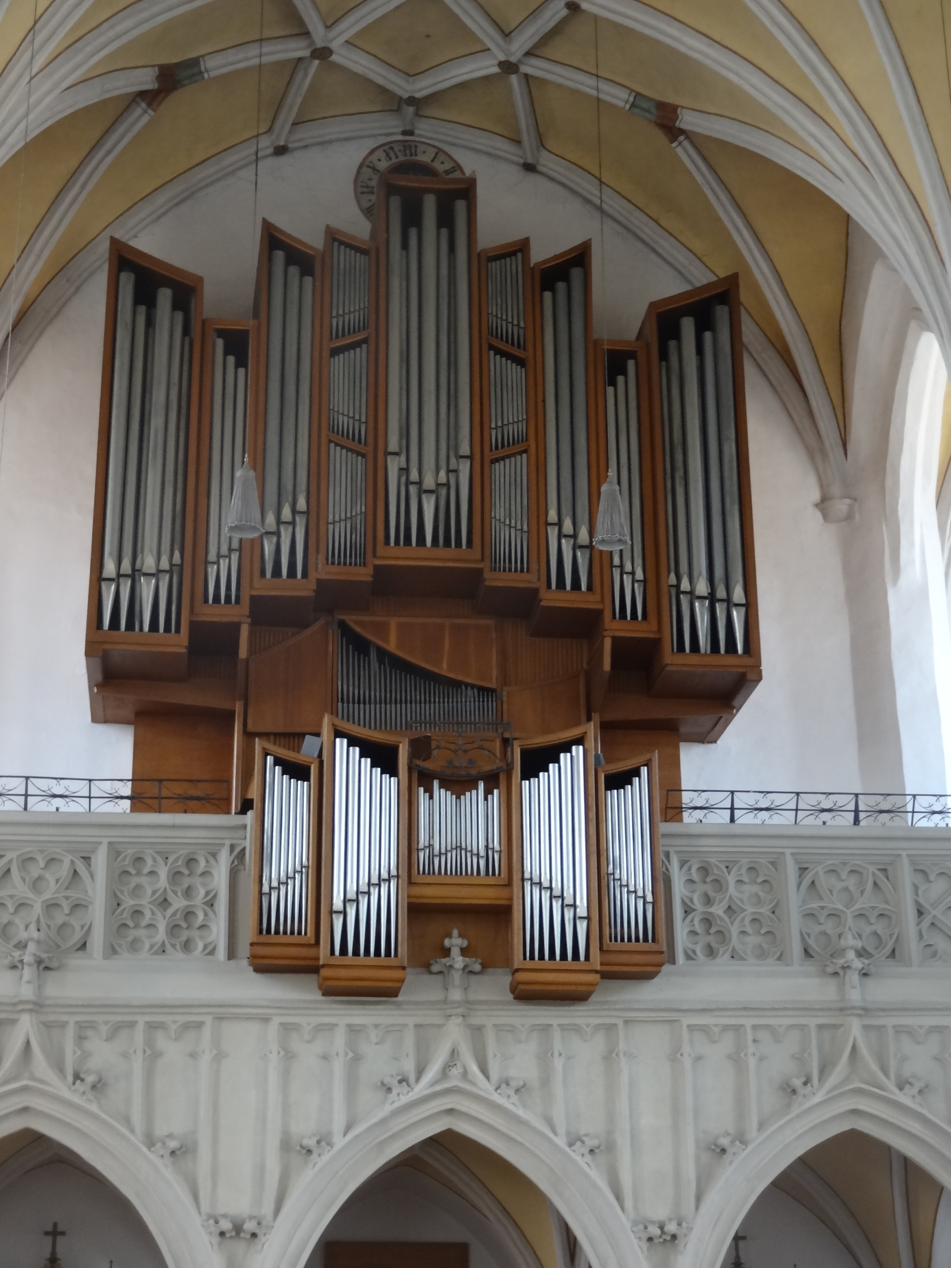 Orgel der Stadtpfarrkirche Mariä Himmelfahrt in Vilsbiburg